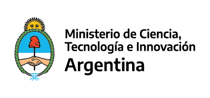 Logo del Ministerio de Ciencia, Tecnología e Innovación de Argentina.